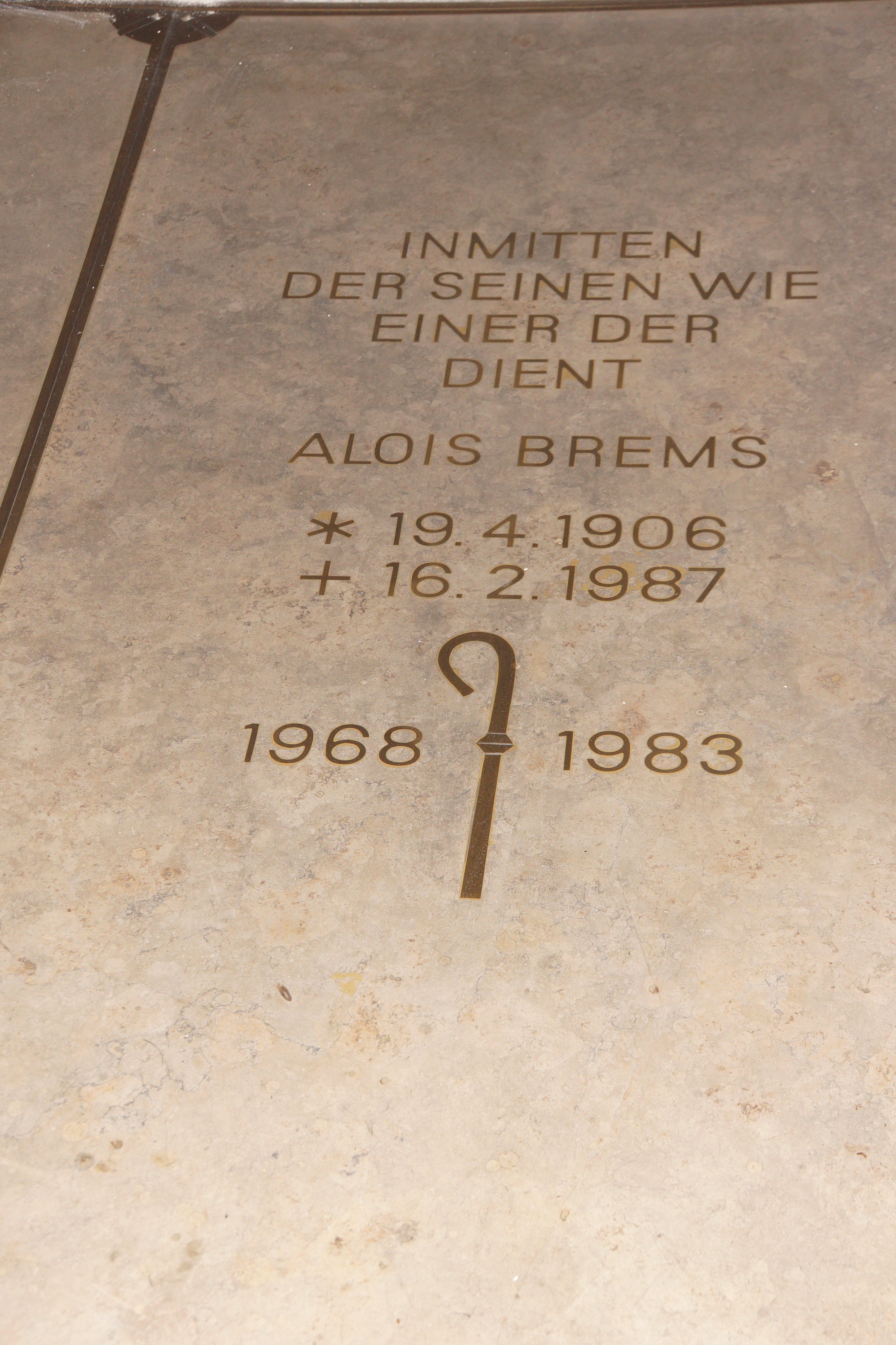 Der Willibaldsdom zu Eichstätt